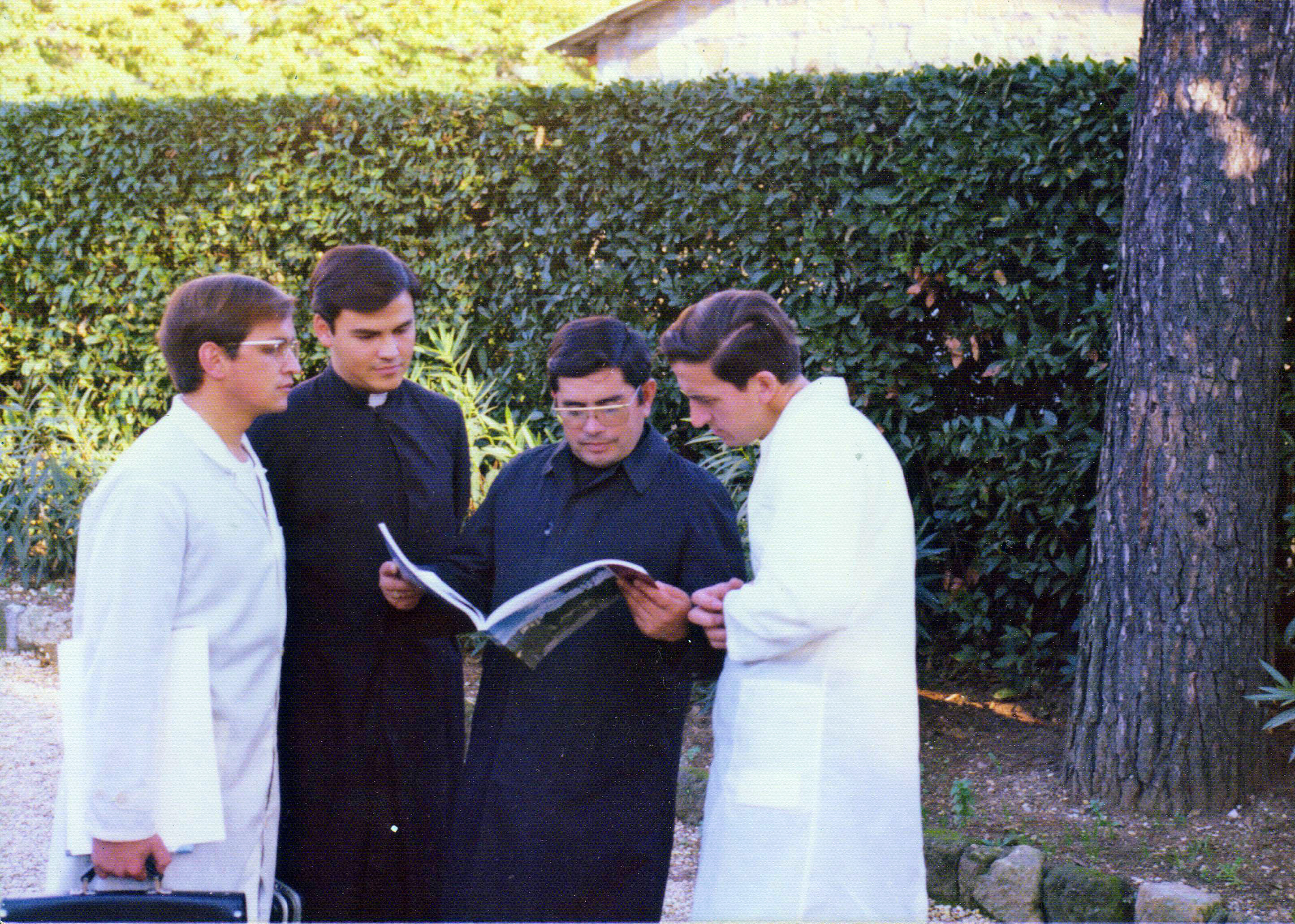 Visita Roma con motivo del Año Santo 1975